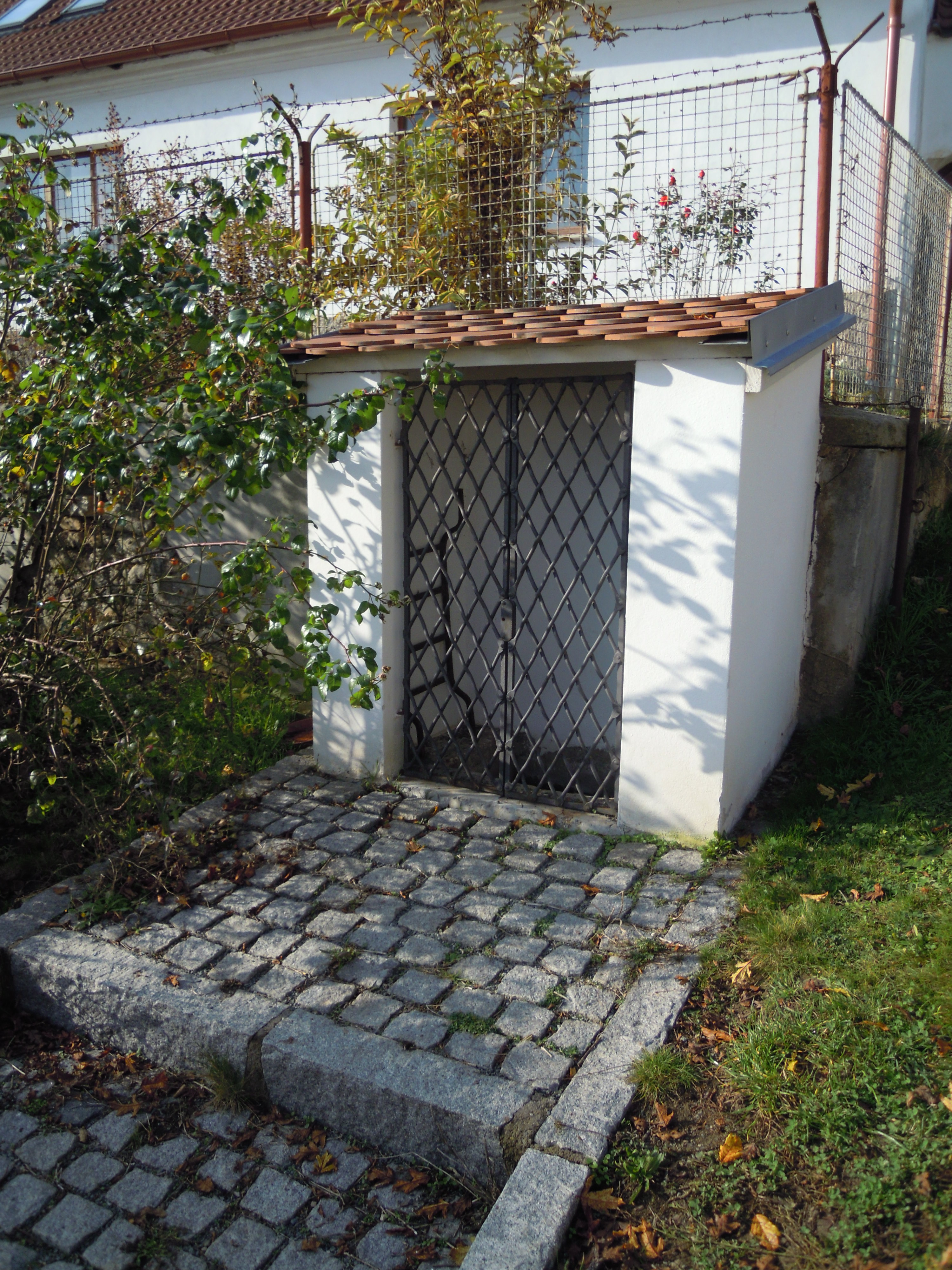 Plzeň-Bolevec, Bolevecká náves, pramen před čp.12, nově upraveno